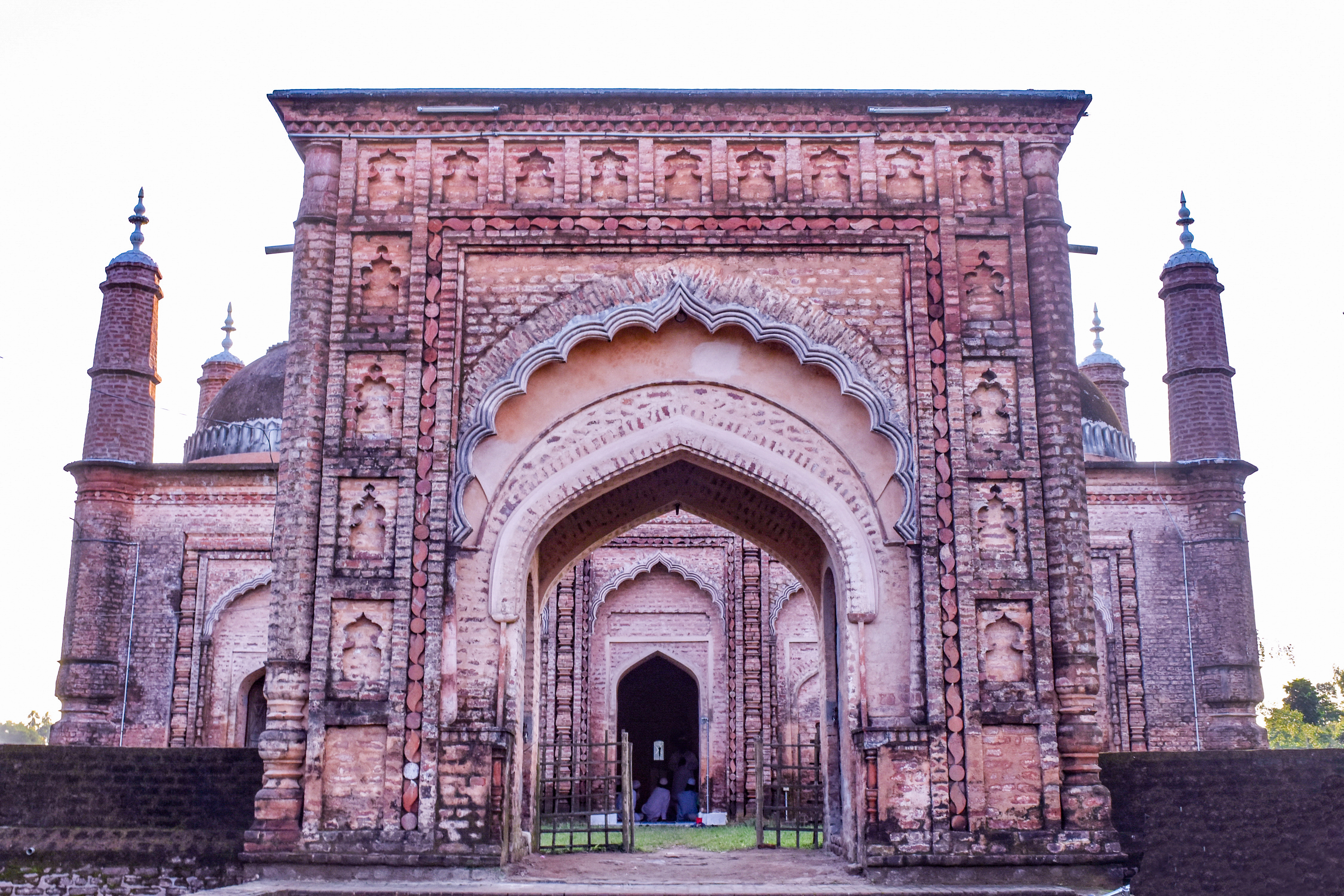 বালিয়া মসজিদ এর সম্মুখ প্রান্ত